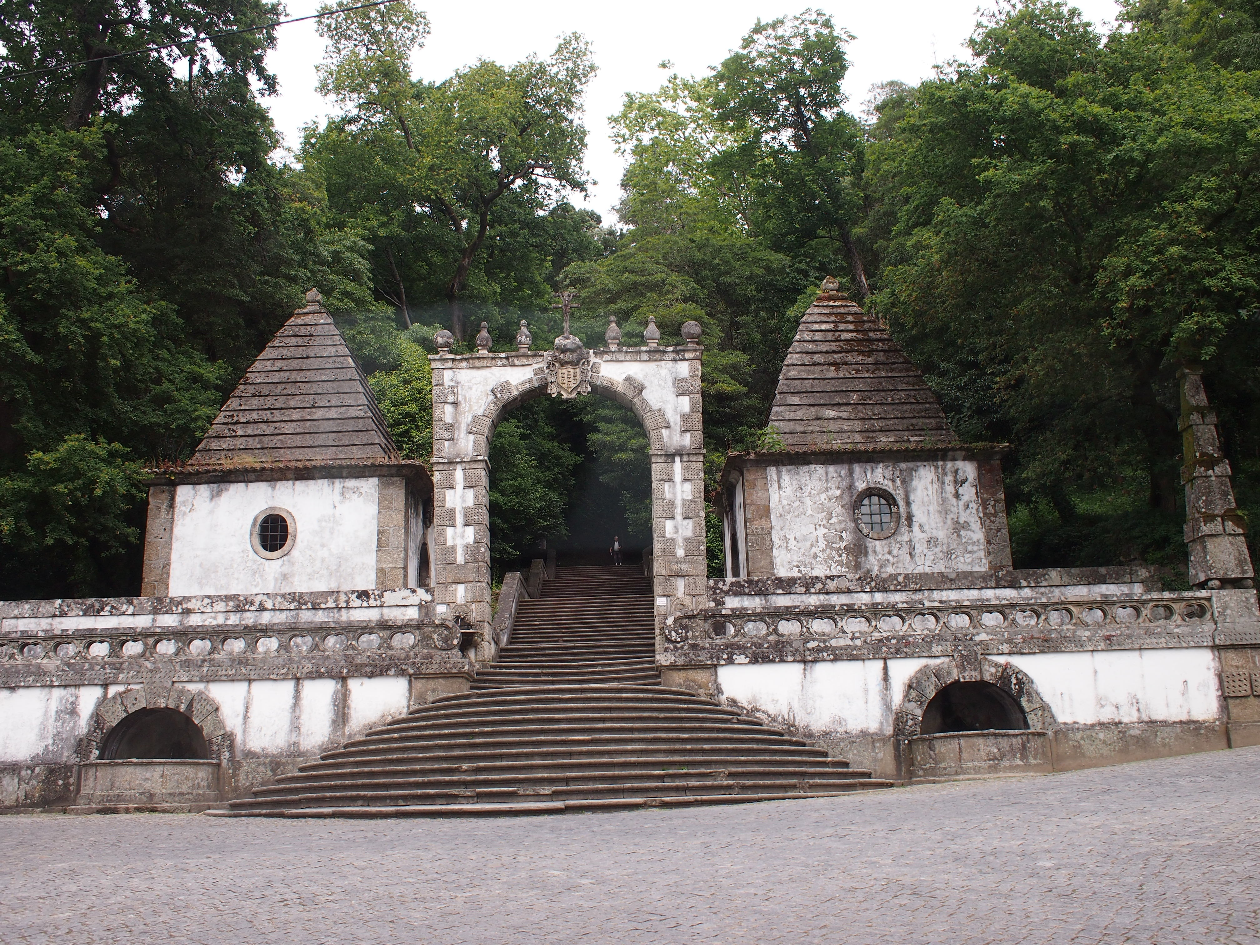 Bom Jesus do Monte